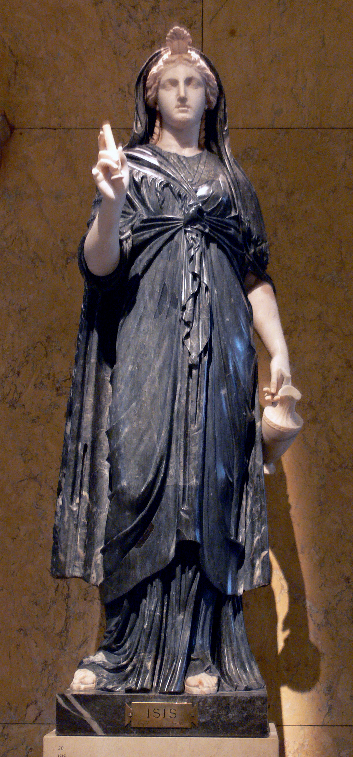 Isis, schwarzer und weißer Marmor, römisch 1. Hälfte 2. Jh. n. Chr. (nach griechischem Vorbild des 4. Jh. v. Chr.), aus Neapel; Kunsthistorisches Museum Wien, Antikensammlung, Inv.-Nr. I 158.